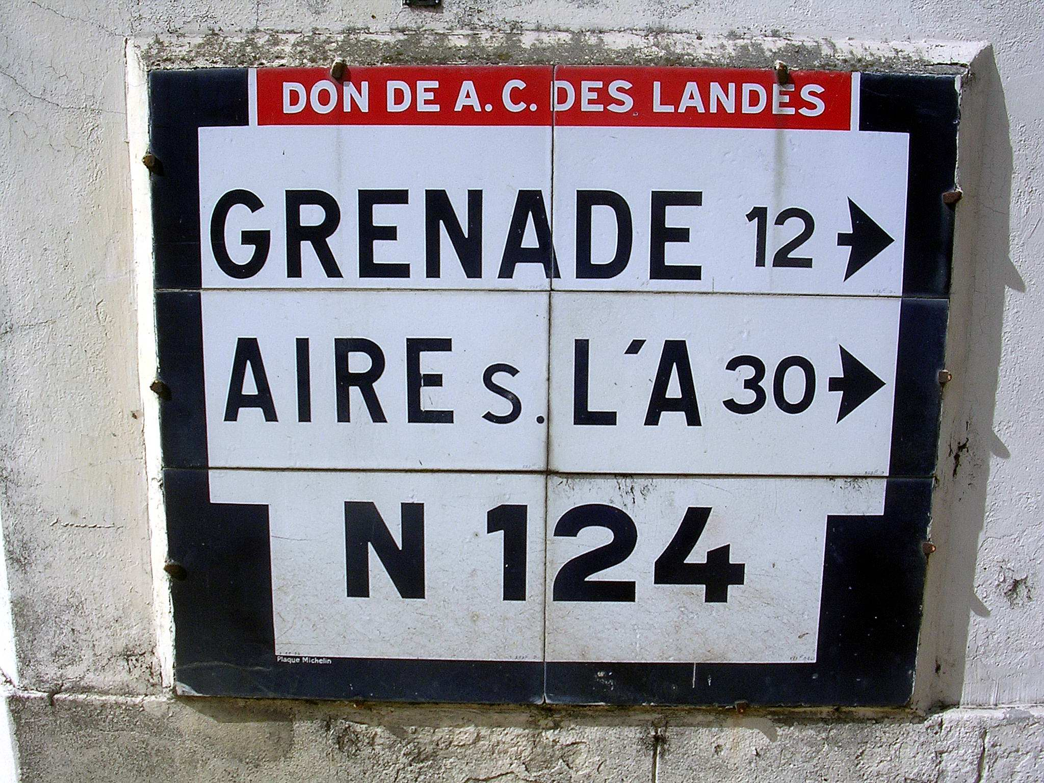 Panneau de signalisation routière Michelin à Saint-Sever, dans le département français des Landes